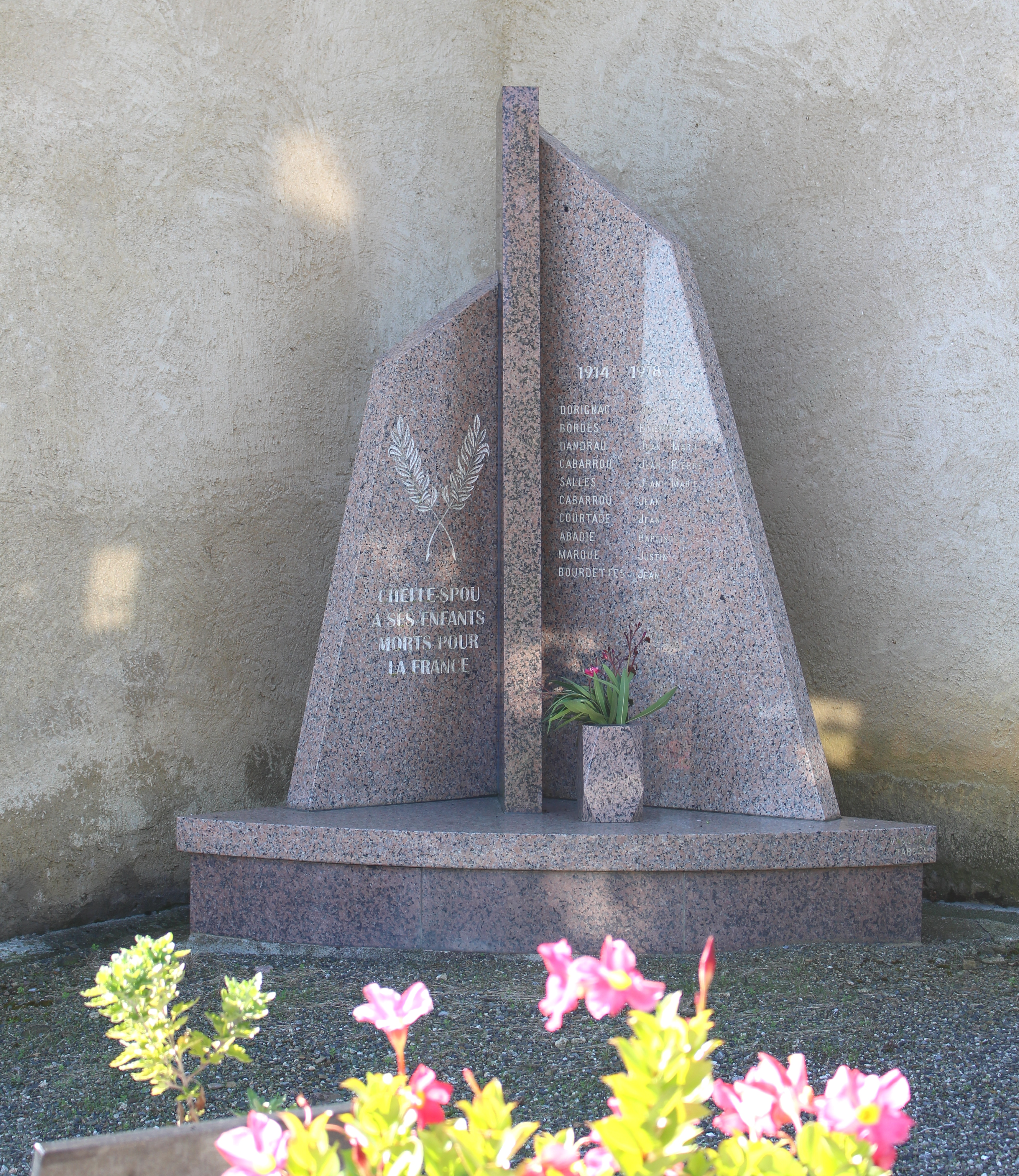 Monument aux morts de Chelle-Spou (Hautes-Pyrénées)